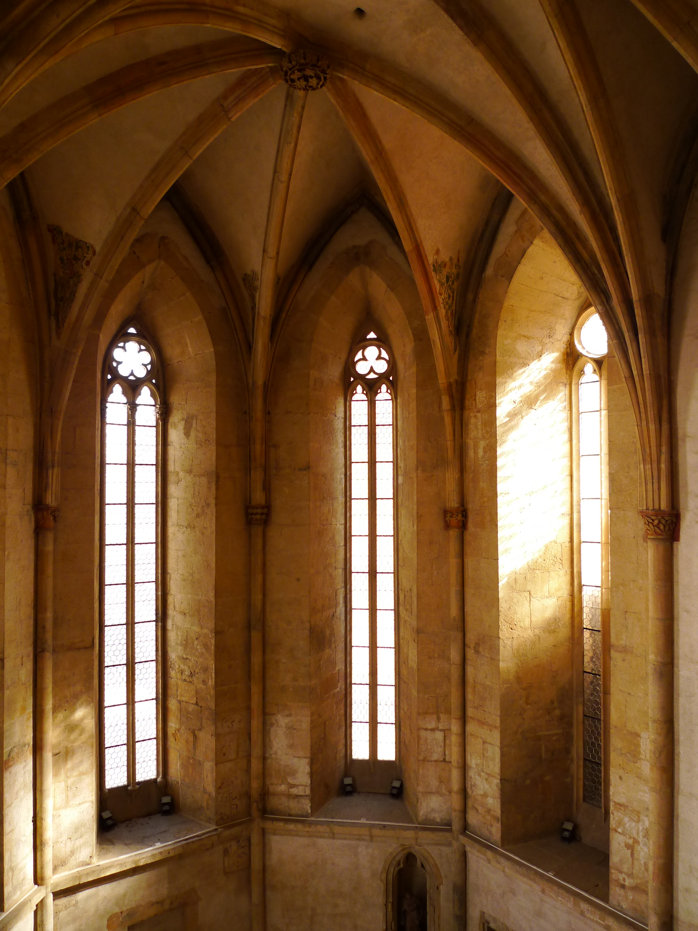 Radnice - býv. komenda Řádu německých rytířů (zámek), s kostelem sv. Kateřiny Chomutov, nám. 1. máje 1, Chomutov